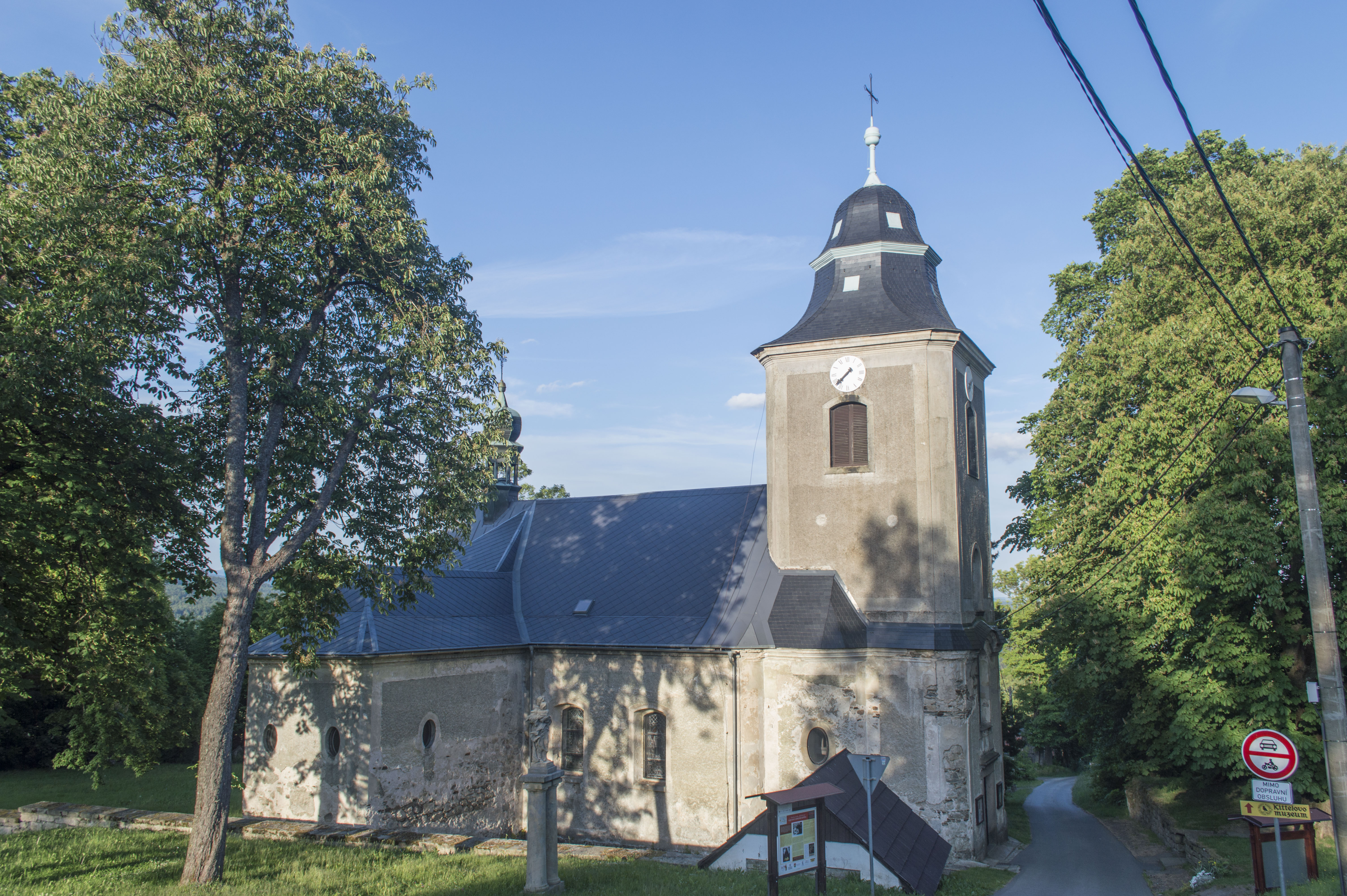 Krásná, součást obce Jistebsko (Pěnčín). Kostel sv. Josefa.